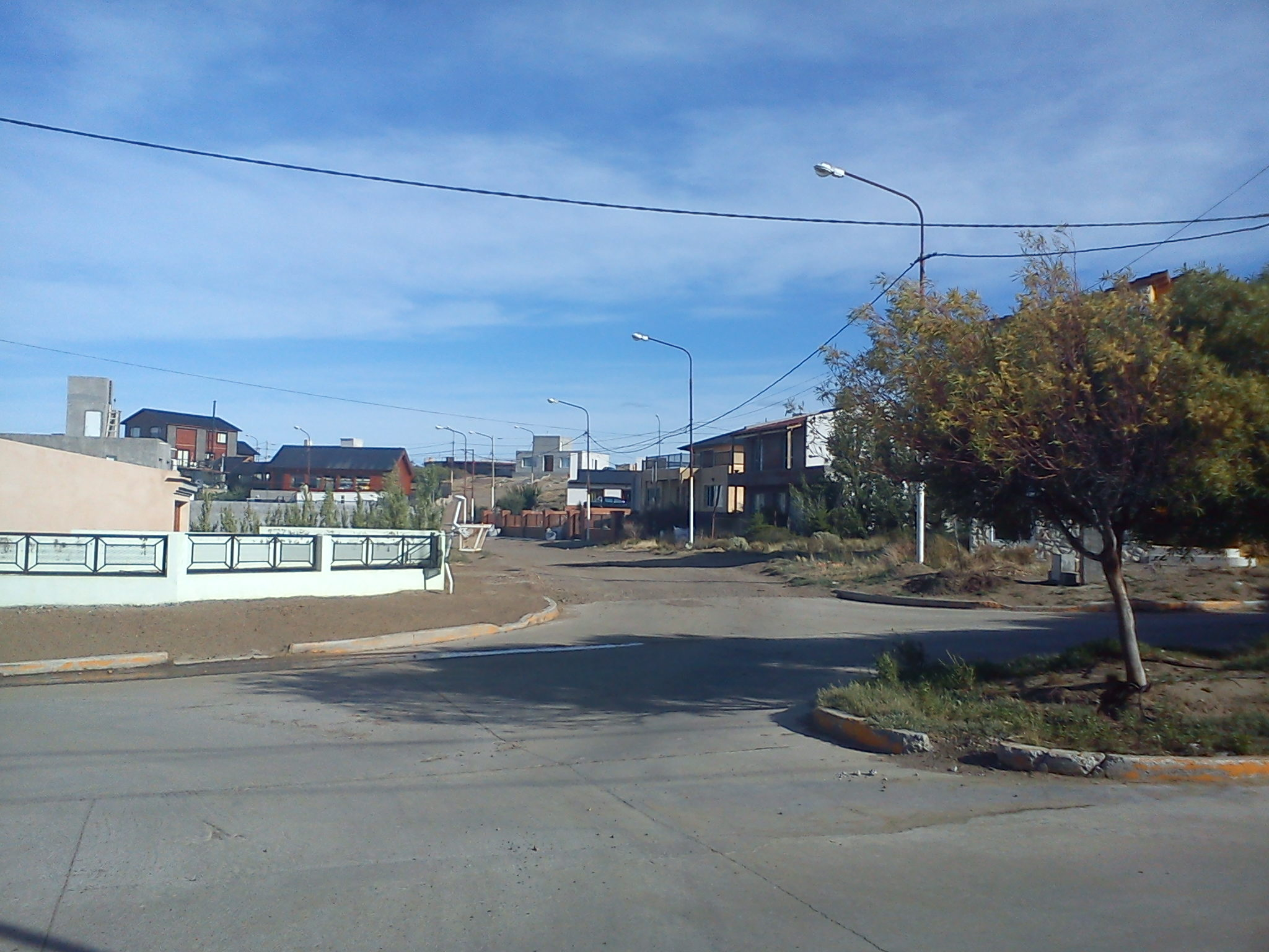 Casas del Barrio Altos del Golfo